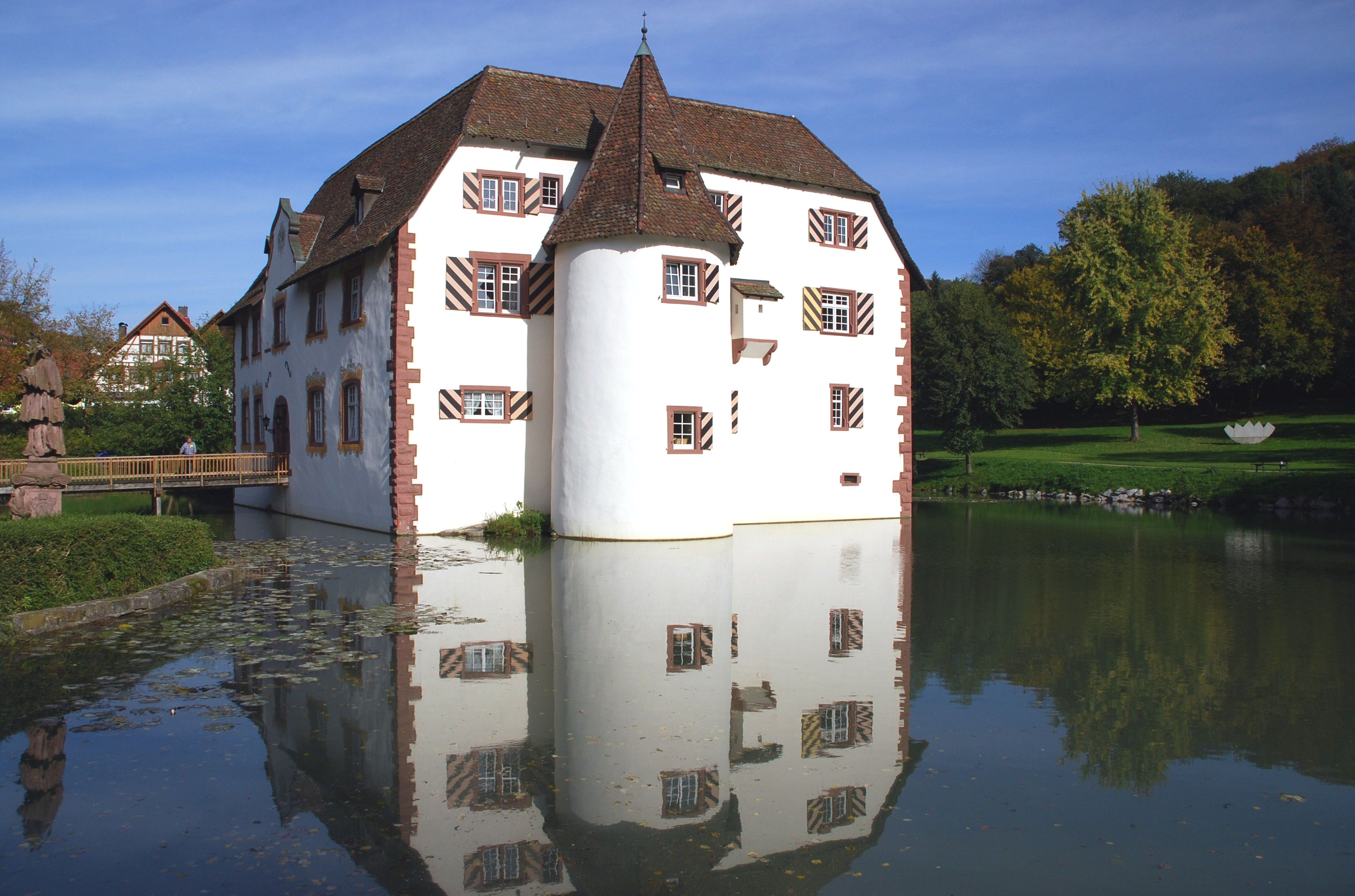 Inzlinger Wasserschloss